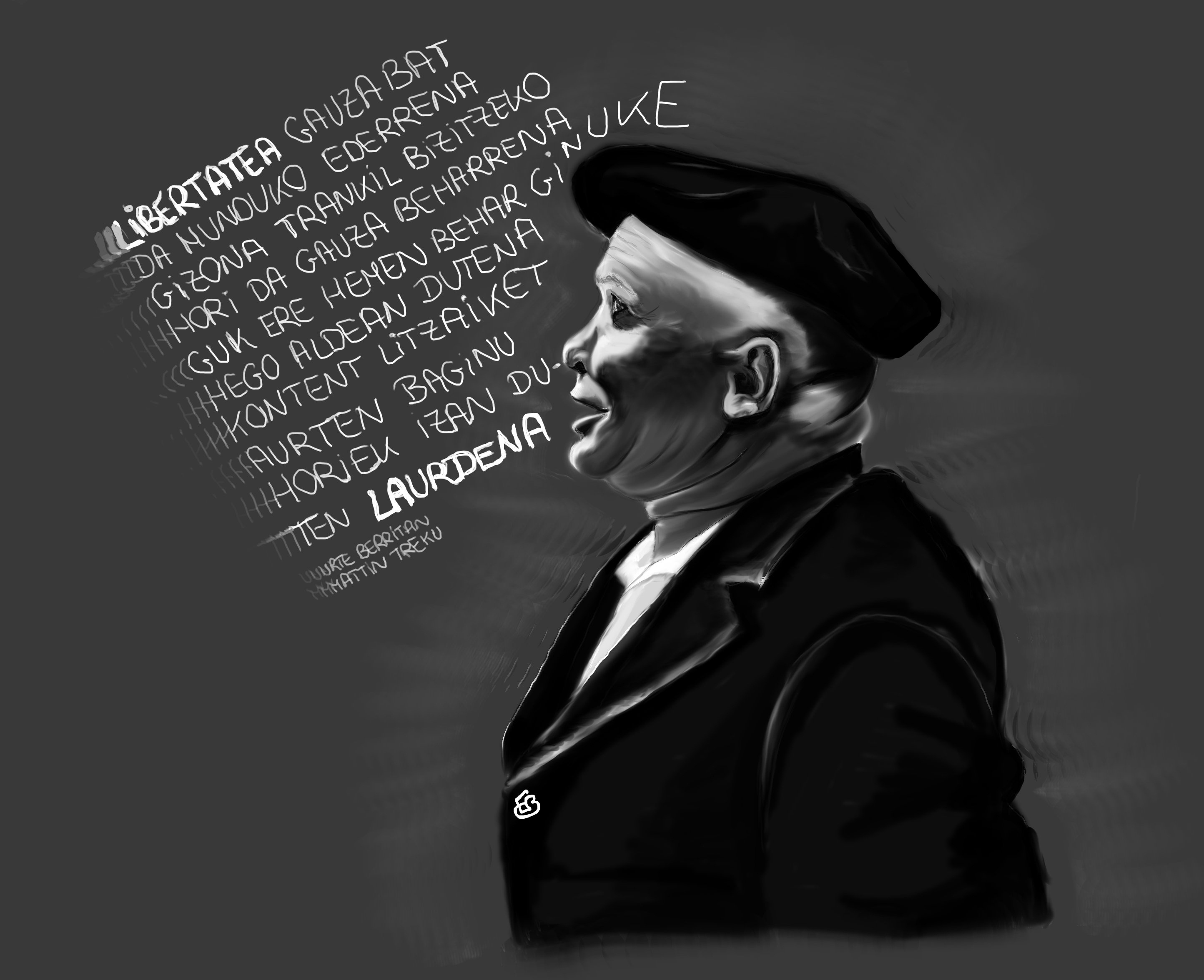 Mattin Treku. Betikotz gurekin (Emma Blanchard-en argazkia, EKE)